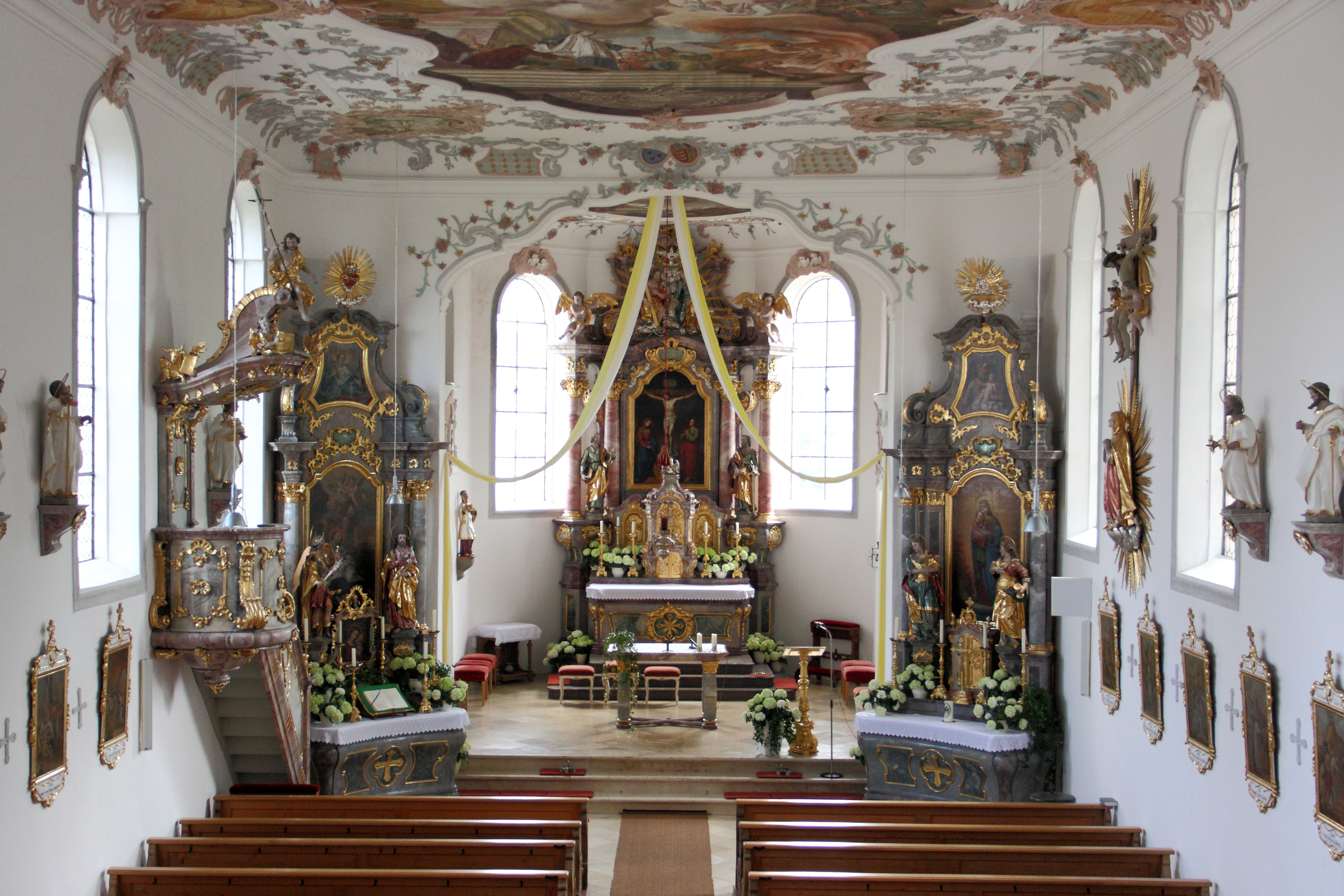 Pfarrkirche Hl. Kreuz, Aletshausen; Ansicht von der Empore